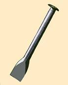 Cortafierro